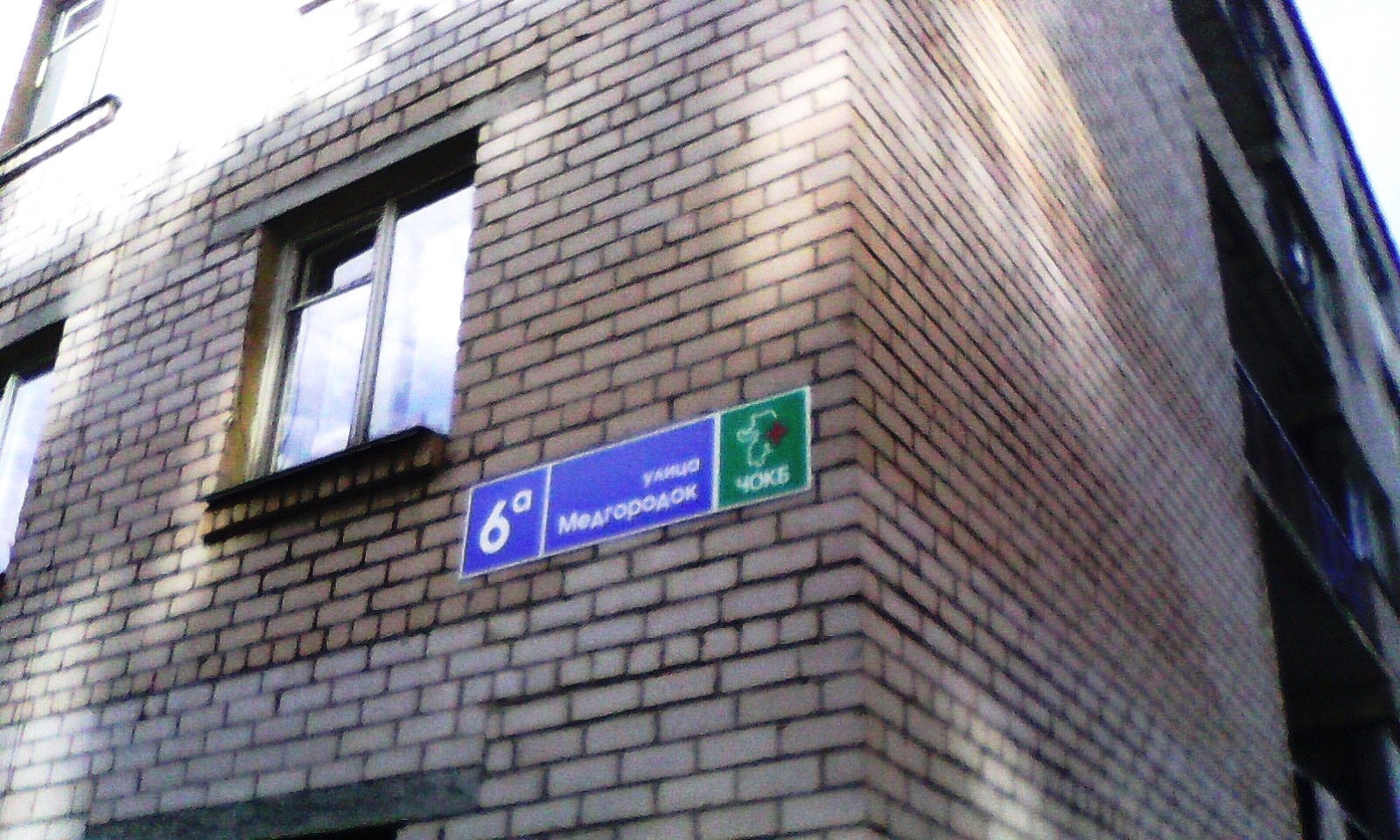 Челябинская областная клиническая больница № 1. Город Челябинск, ул. Воровского, 70. Одно из общежитий для персонала (ул. Медгородок, 6А).